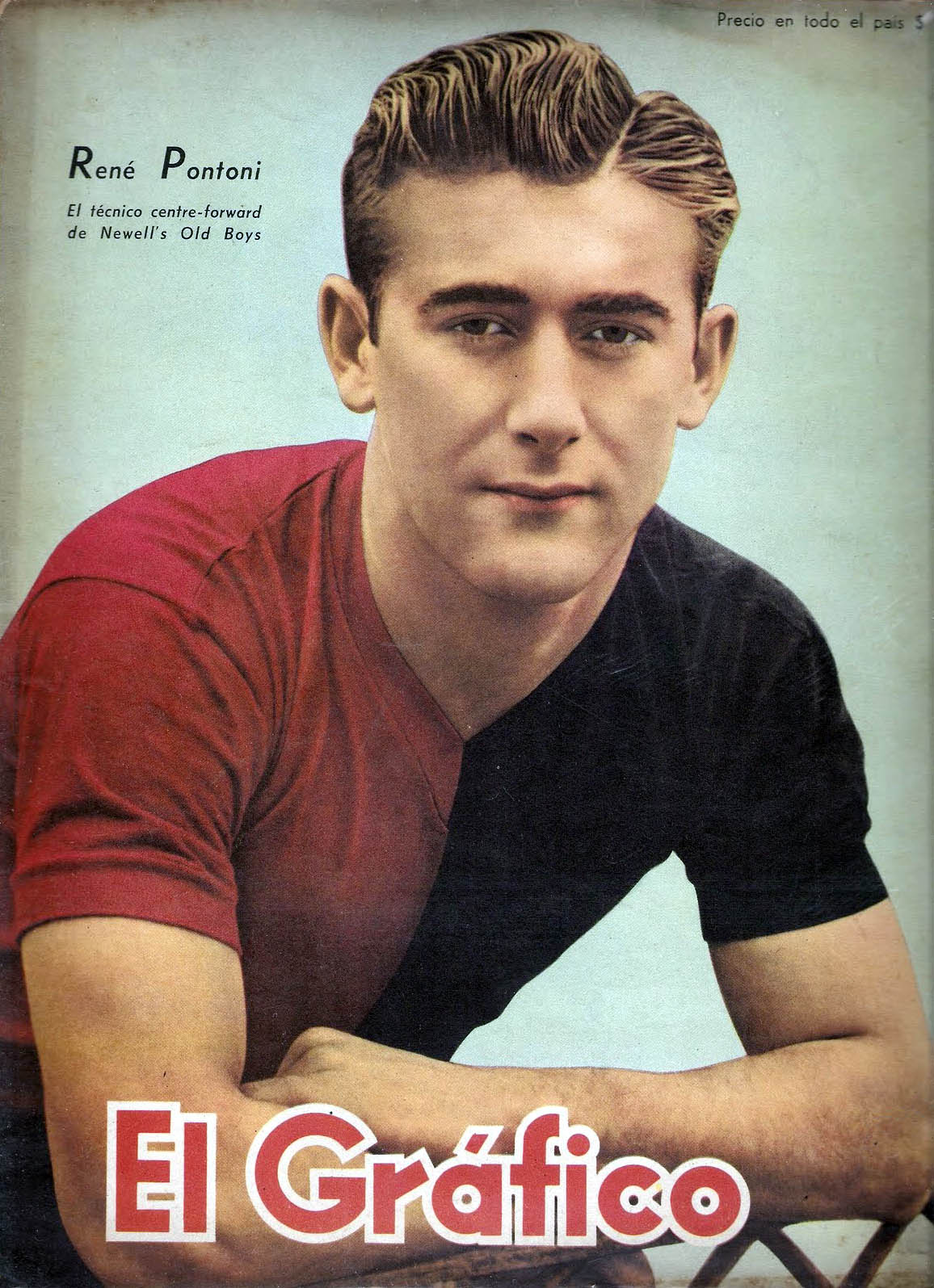 Tapa revista El Gráfico con René Pontoni, centre-forward de Newell's Old Boys. Año 1942